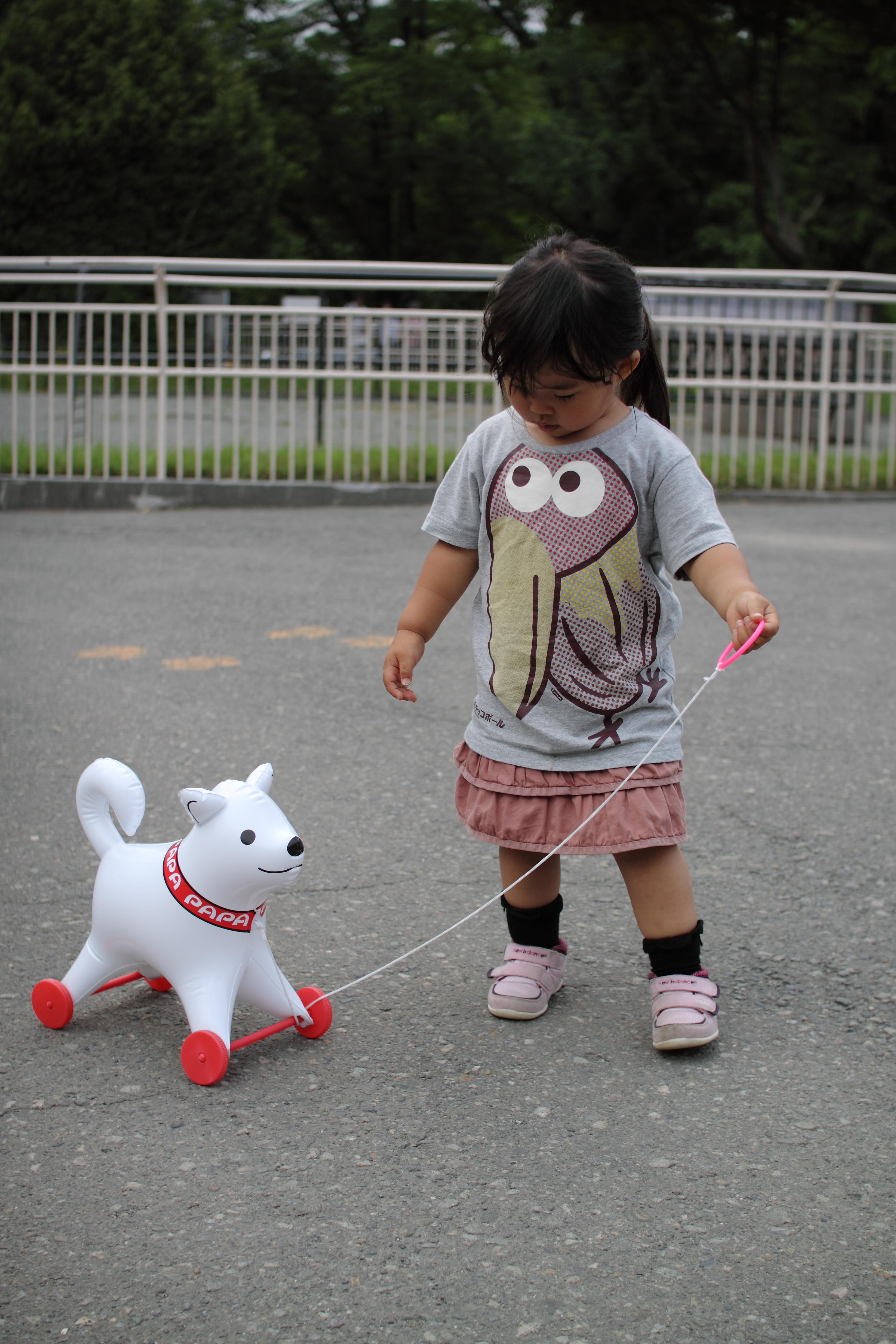 My daughter. 円山動物園の売店にて娘が欲しがったのは、よりにもよってソフトバンク犬のコレ。こんな、しょーもないのが800円もするんだぜぇ・・・ まぁ、そのお陰で一日ずっと抱っこを要求されることもなく歩いてくれたのですが。